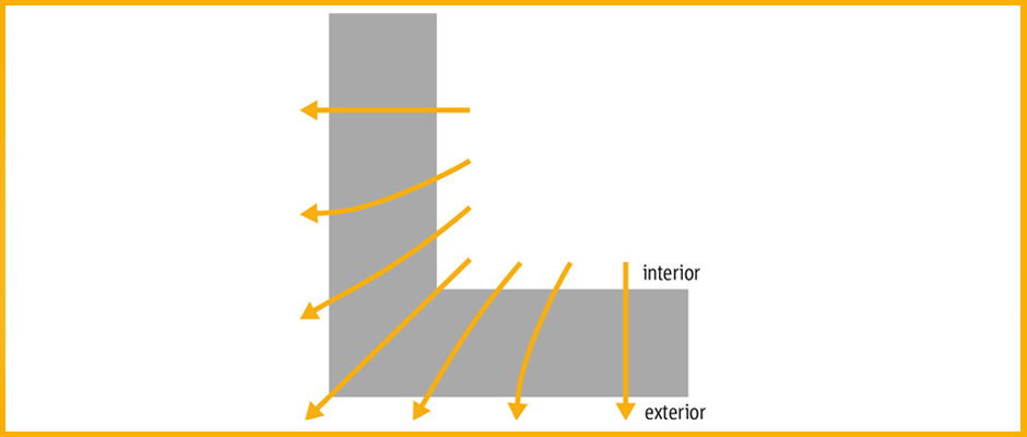 Joonis 3